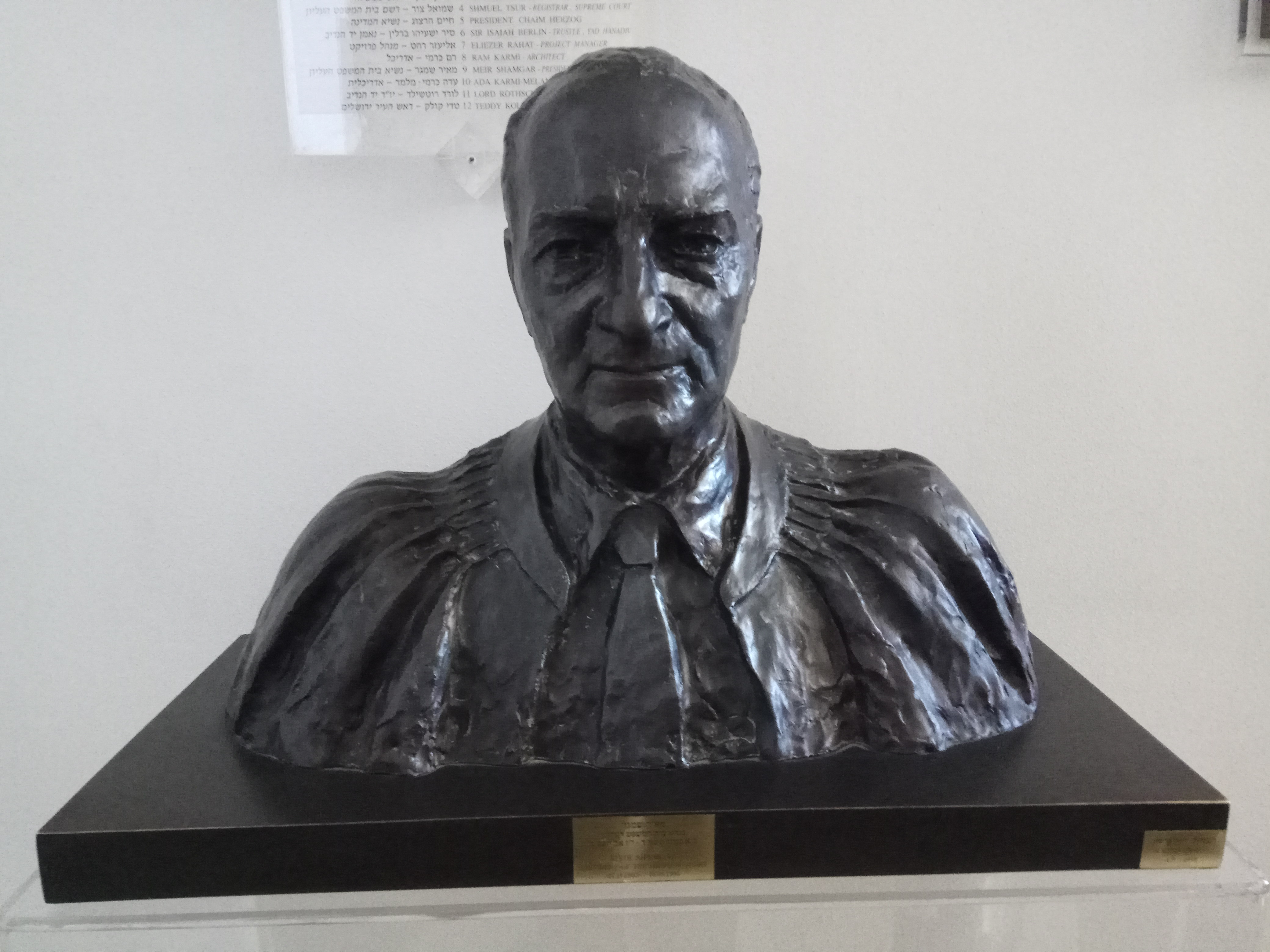 פסל של מאיר שמגר בבית המשפט העליון בירושלים. הפסלת היא רזיה גרשון